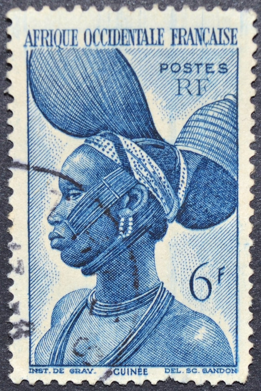 Stamp of French Western Africa, Guinea, 6f, 1947